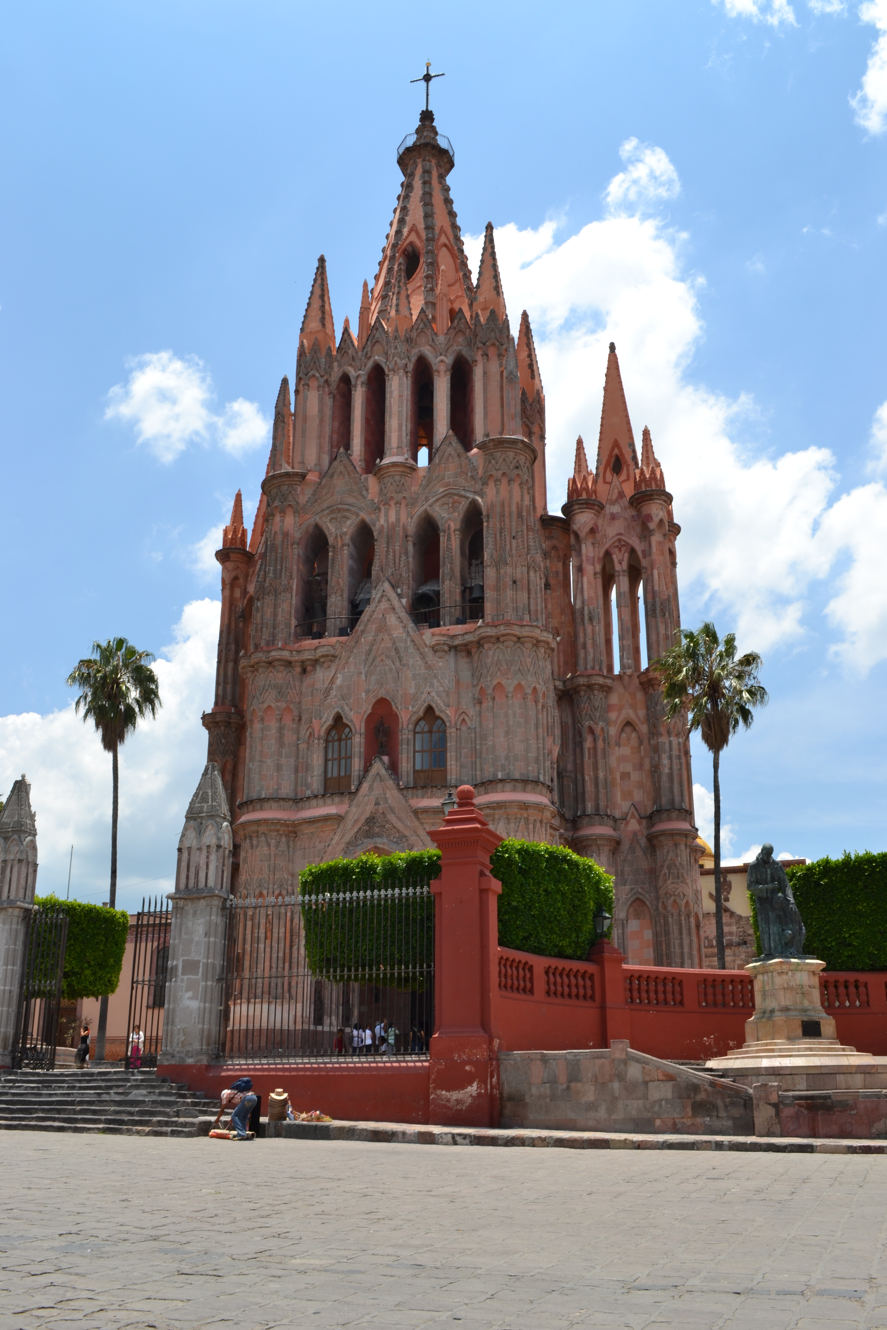 Iglesia estilo gótico de San Miguel de Allende, Guanajuato